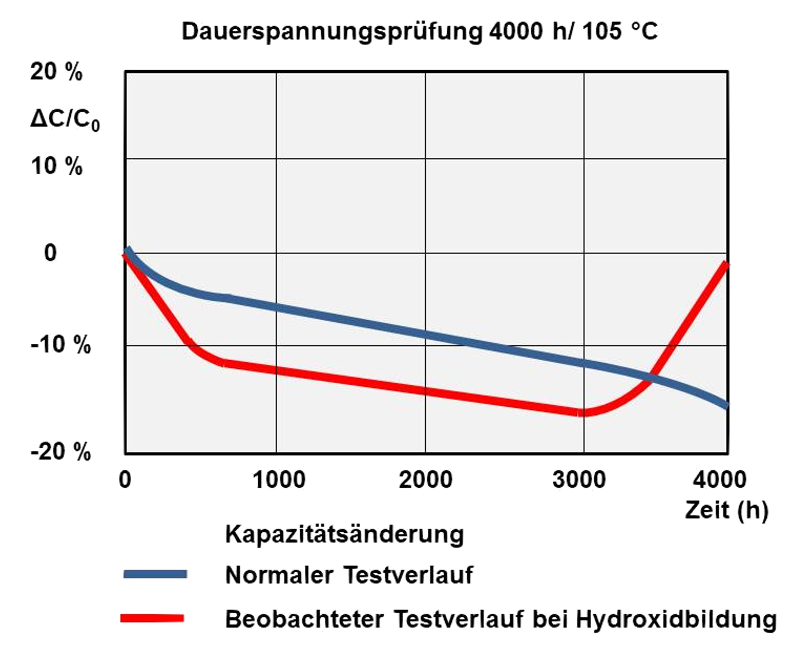 Kapazitätsverlauf während einer Elko-Lebensdauerprüfung